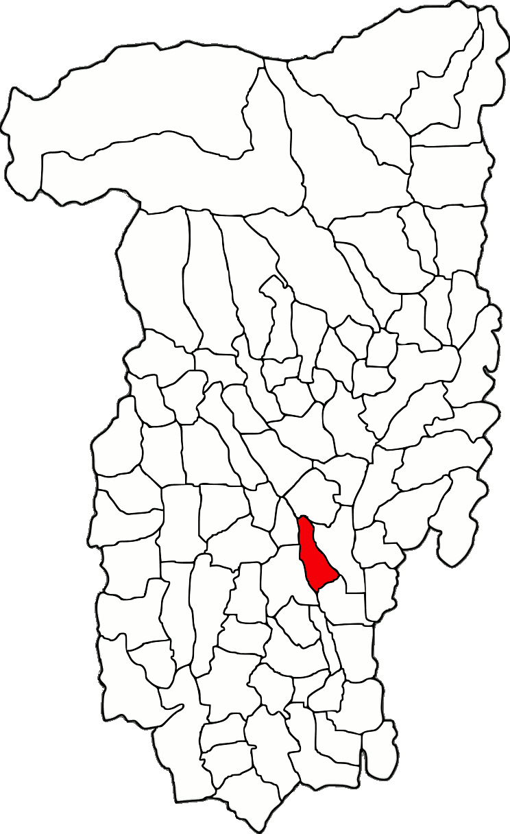 Lage der Gemeinde Scundu im Kreis Vâlcea (RO).